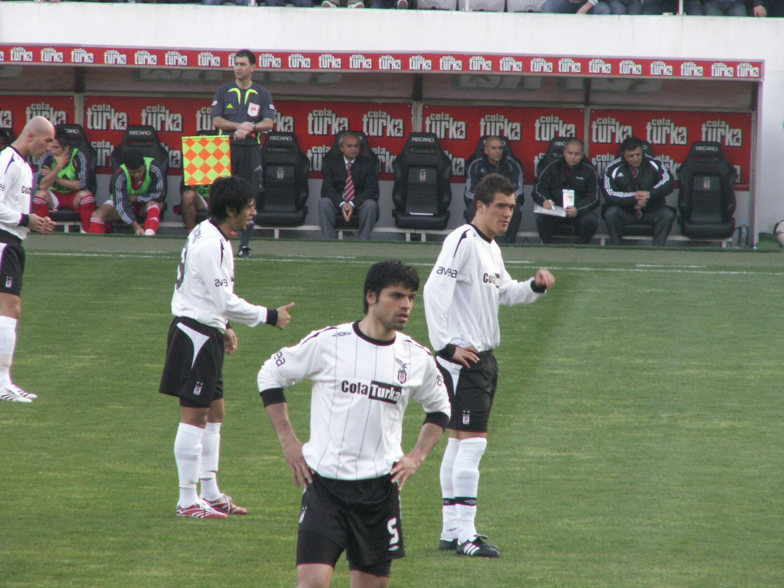 Besiktas defenders at BJK İnönü Stadyum